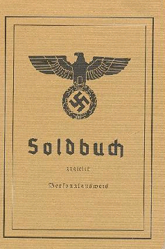 Soldbuch der Wehrmacht, Vorderseite